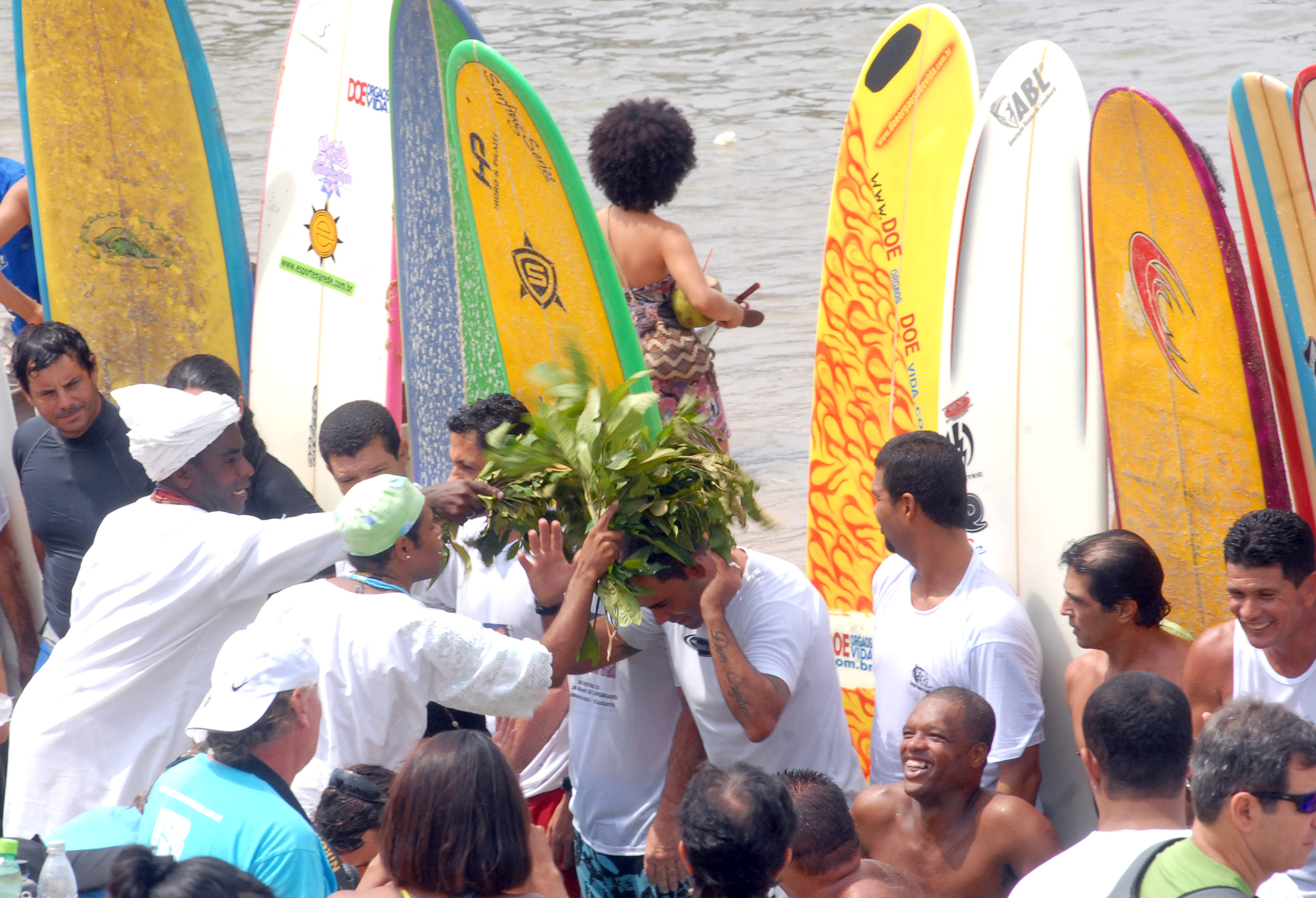 Surfistas na Festa de Iemanjá na Praia do Rio Vermelho, Salvador, Bahia, Brazil